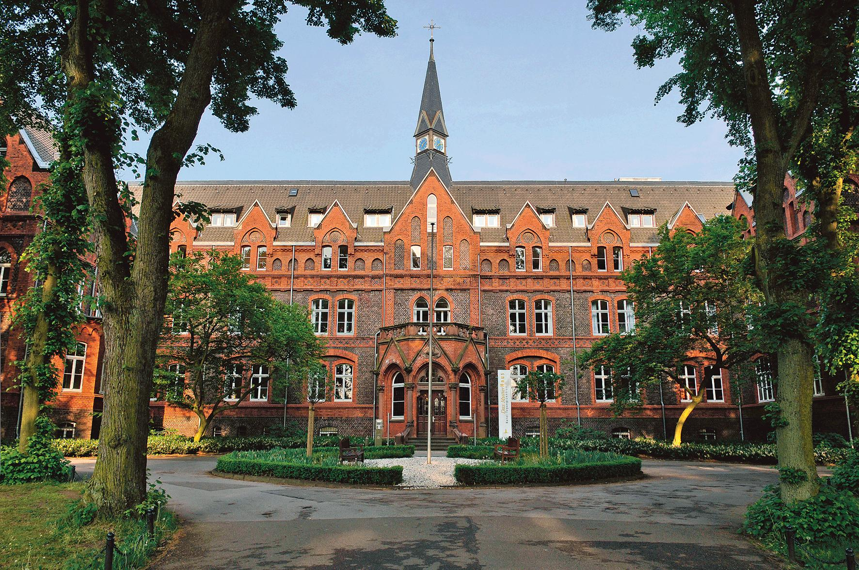 Mutterhaus der Kaiserswerther Diakonie in Duesseldorf